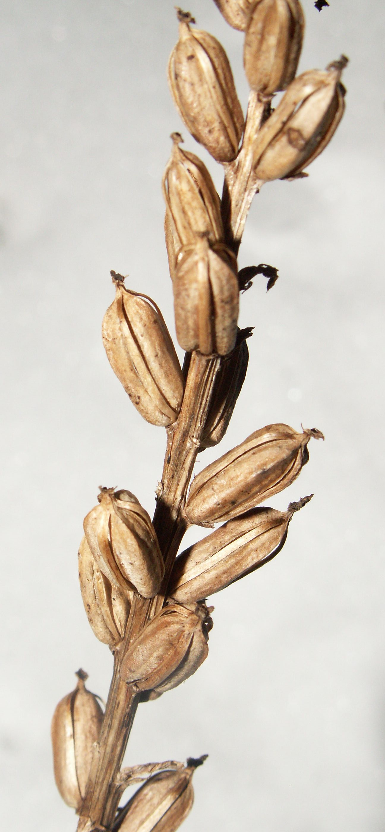 Dactylorhiza fuchsii, Fruchtsstand